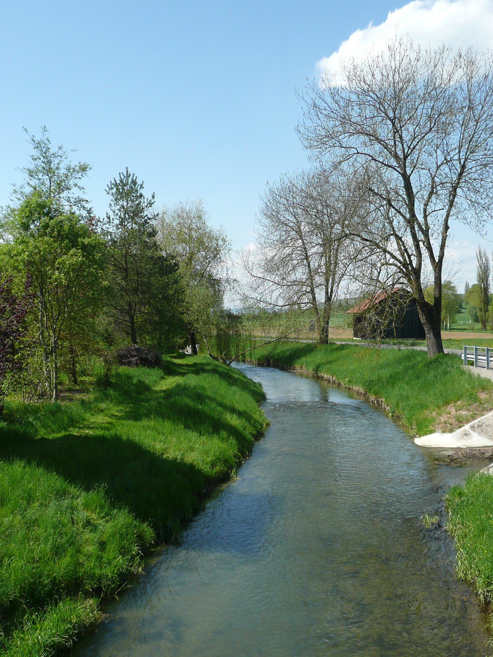 Der Fluss Biber bei Ramsen SH.